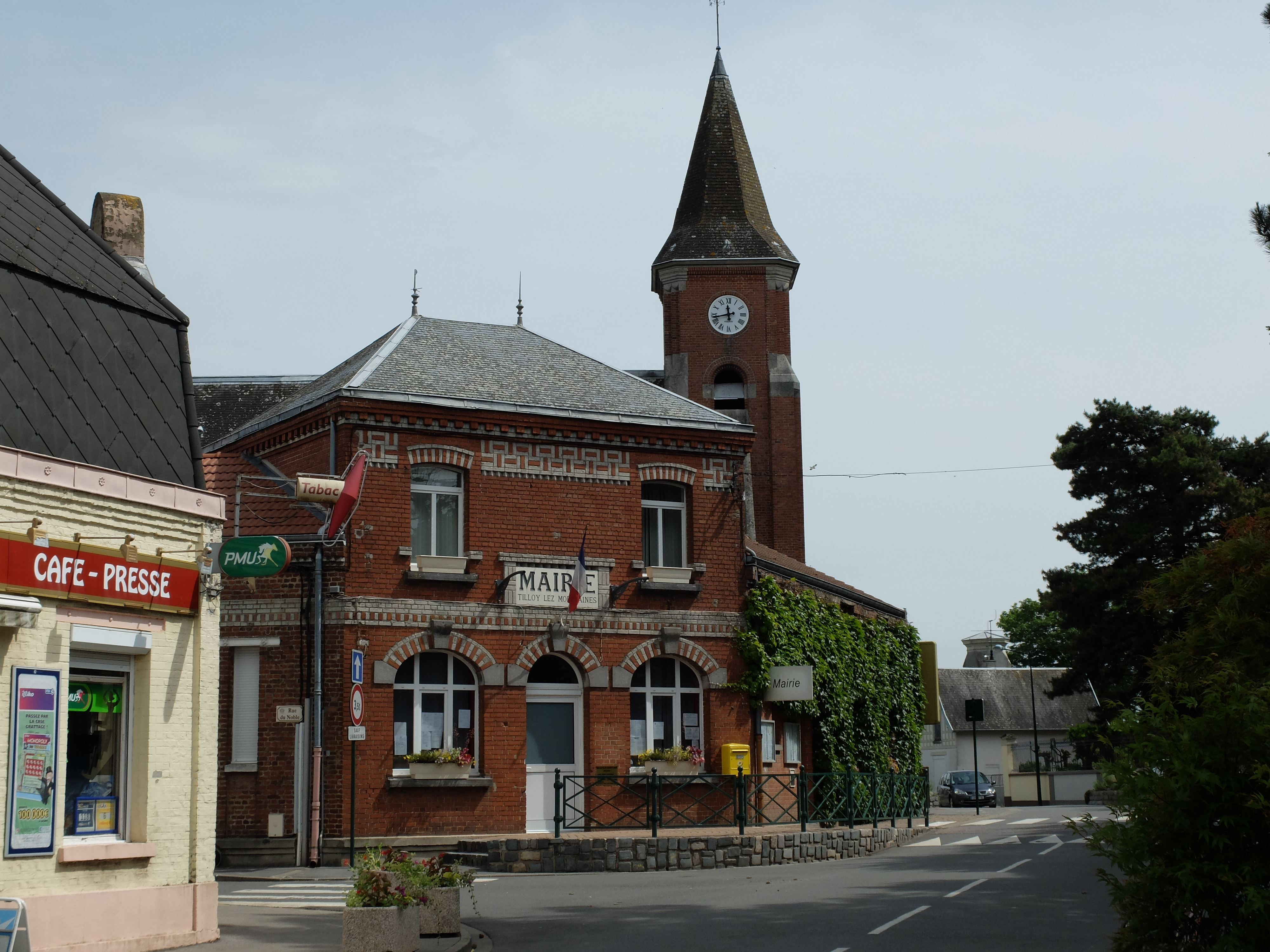 Vue de la mairie de Tilloy-lès-Mofflaines. Le clocher de l'église est présent également.